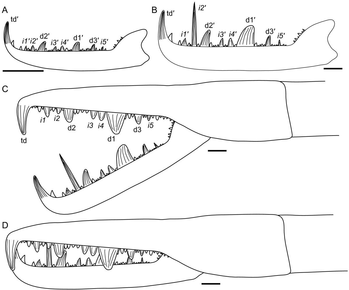 Jaekelopterus howelli chelicera. Reconstruction of the juvenile and adult morphology of the chelicera. A: Juvenile free ramus. B: Adult free ramus. C: Adult articulated fixed and free ramus, agape. D: Adult articulated fixed and free ramus, occluded. Abbreviations: td = terminal denticle of fixed ramus; d1–d3 = principal denticles of the fixed ramus; i1–i5 = intermediate denticles of the fixed ramus; td′ = terminal denticle of the free ramus; d1′–d3′ = principal denticles of the free ramus; i1′–i5′ = intermediate denticles of the free ramus. Scale bars = 10 mm.